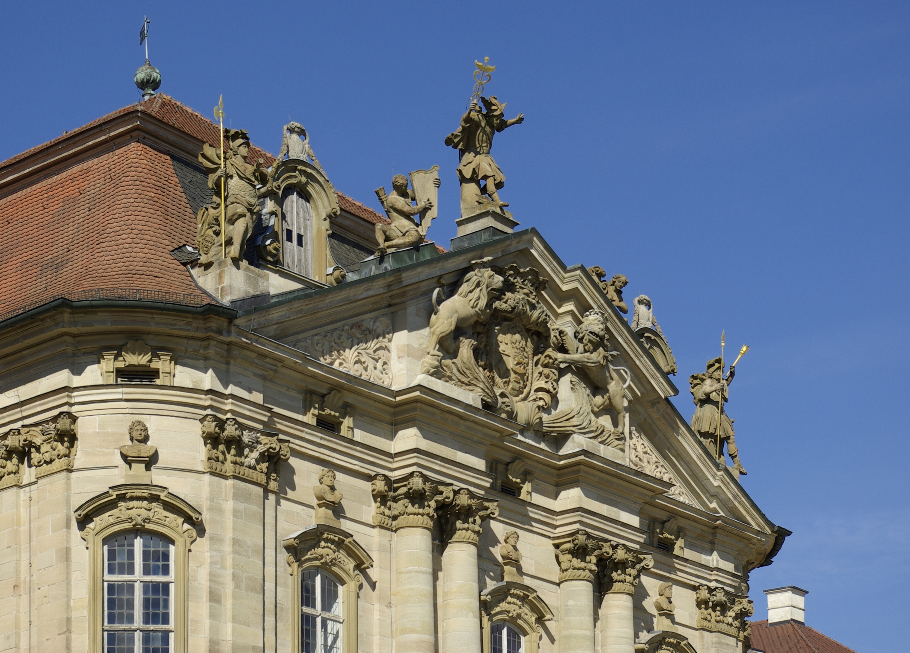 Schloss Weißenstein in Pommersfelden.